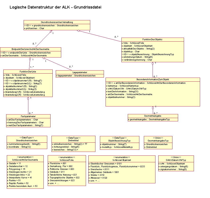 Logische Datenstruktur der ALK-Grundrissdatei in UML Autor BerholdWagner